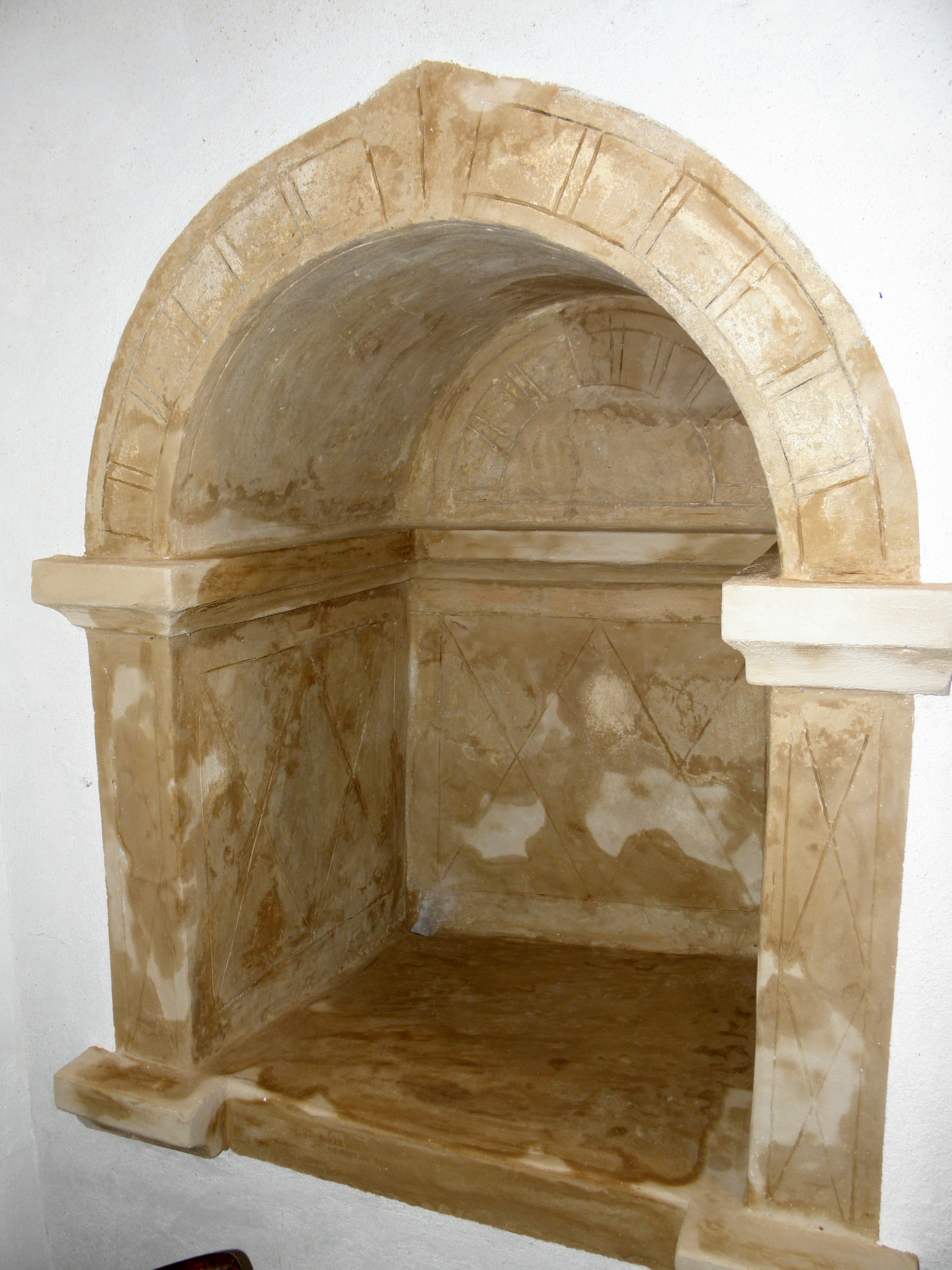 Bagnoletto, località di Bagnoli di Sopra: interno dell'oratorio di San Daniele, già parrocchiale, risalente al XIII secolo: il fonte battesimale sito nella piccola sagrestia.